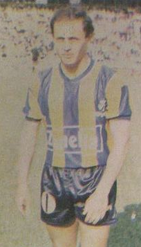 Raúl Chaparro